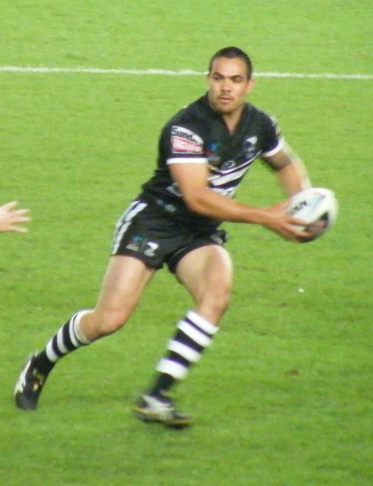 New Zealand interchange Dene Halatau. RLWC 2008.